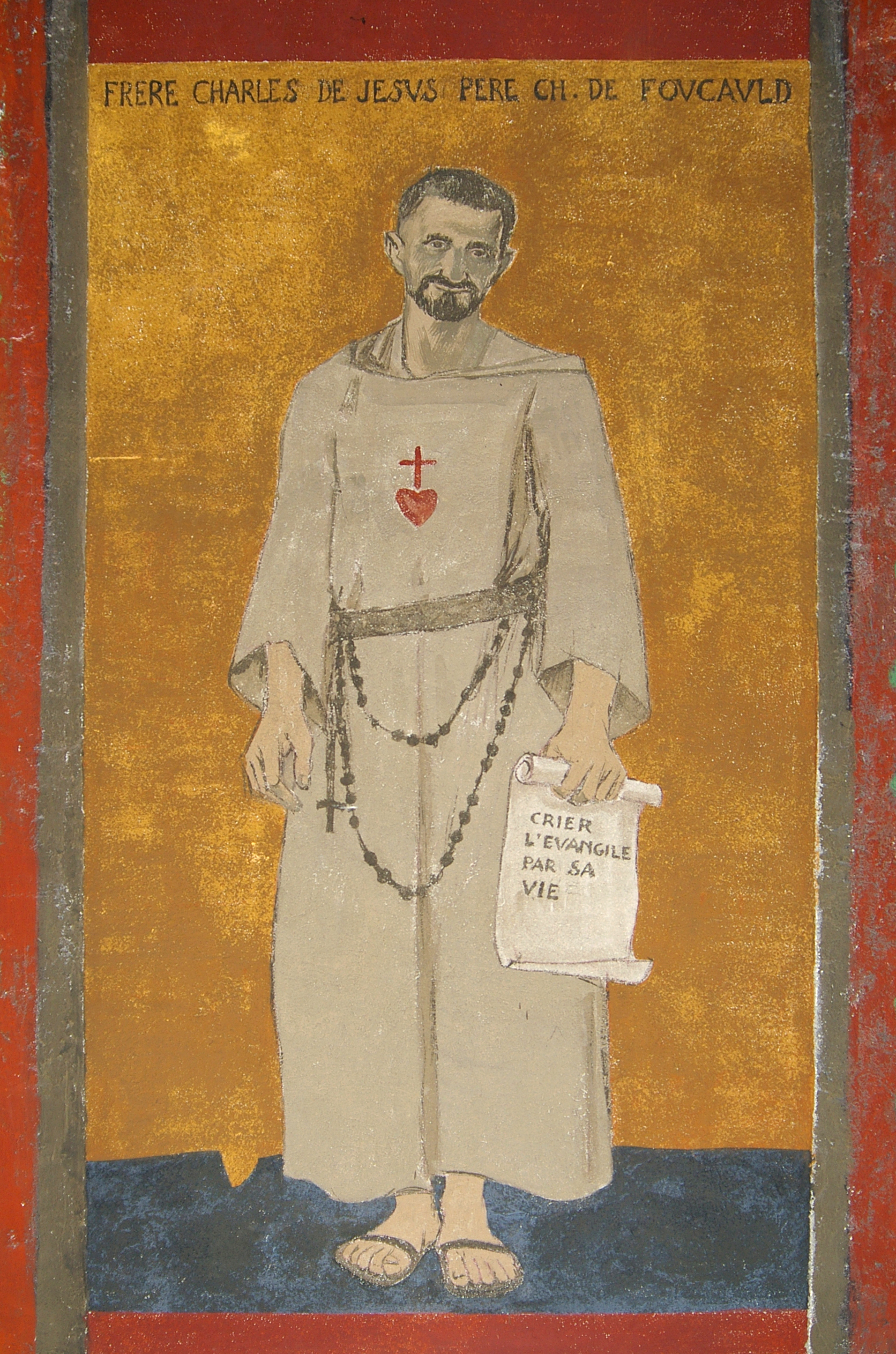 Photo de Bernard Forien